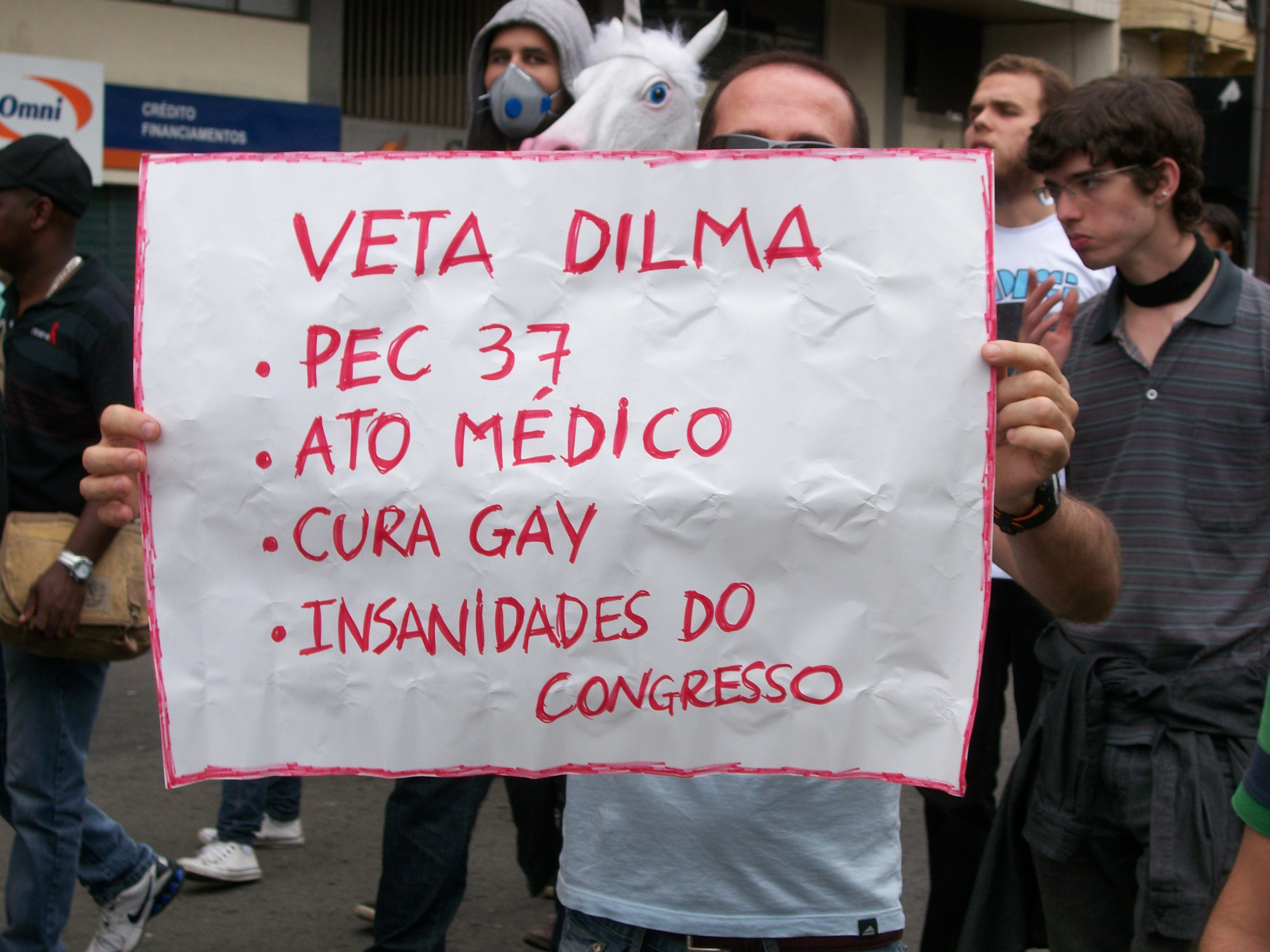 Manifestante no Dia do Basta 2013 (22 de junho) em Juiz de Fora pedindo veto ao PEC 37, ato médico e cura gay.